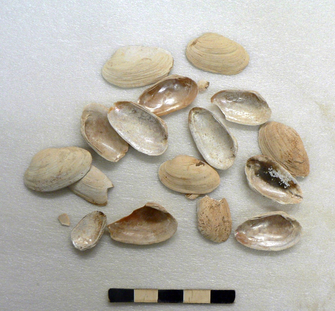 קונכיות פלאוליתיות מעמק הנילוס